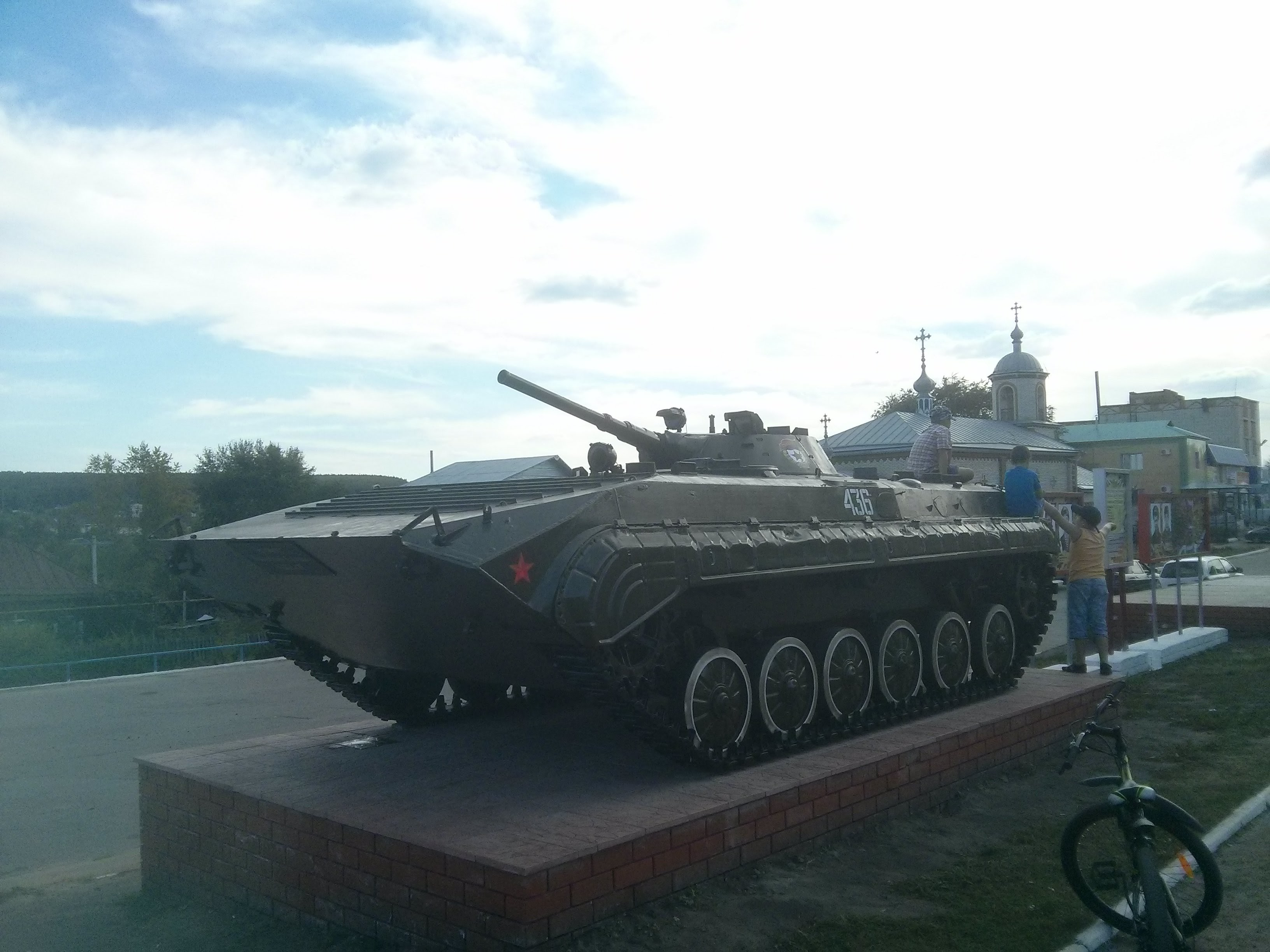 БМП-1 в Николаевке